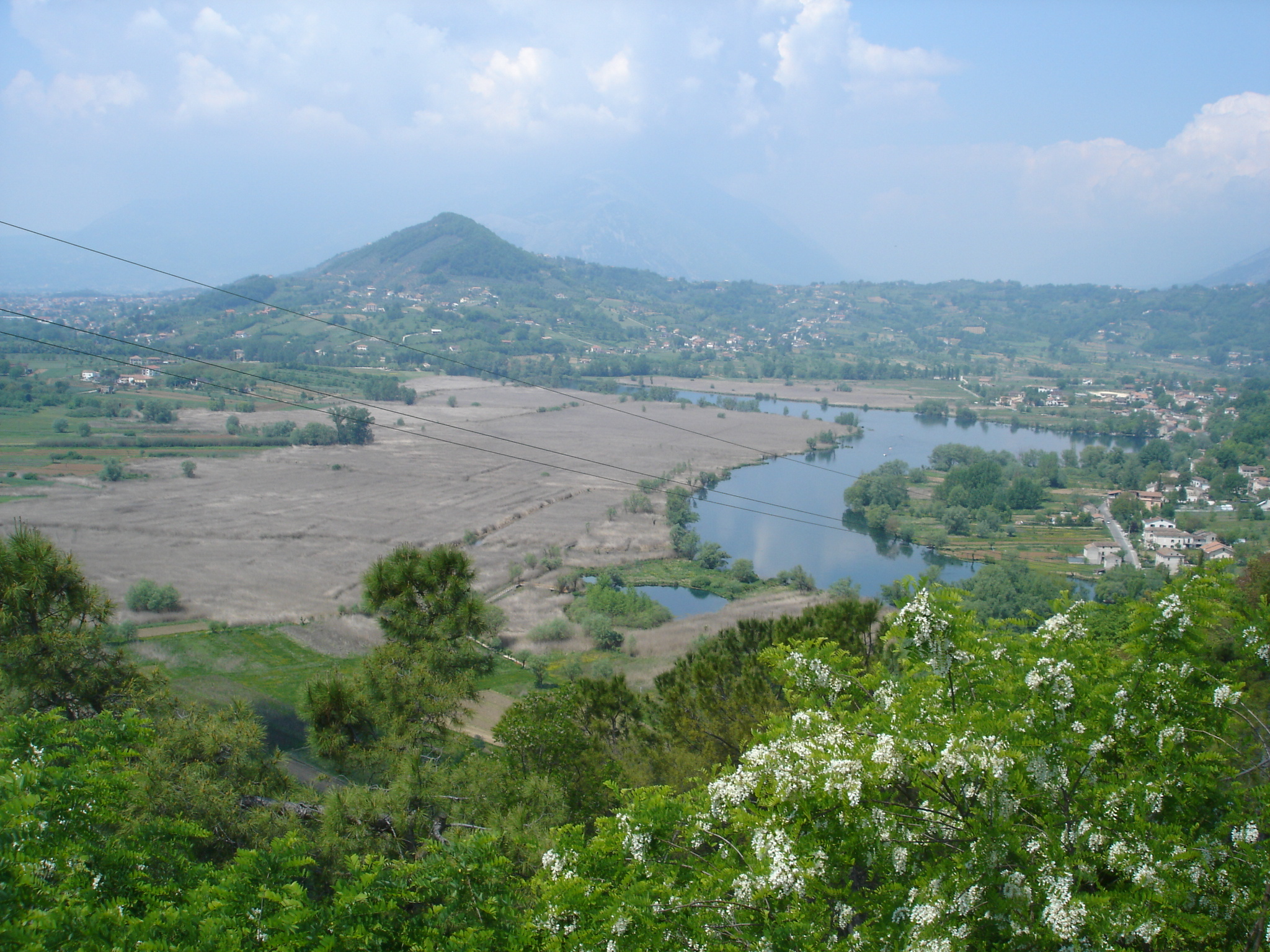 Panorama del Lago di Posta Fibreno